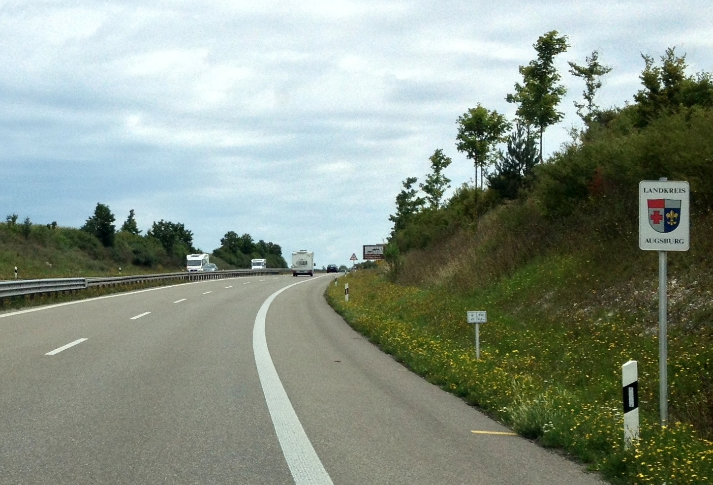 Landkreisschild an der B17 nördlich Landsberg am Lech